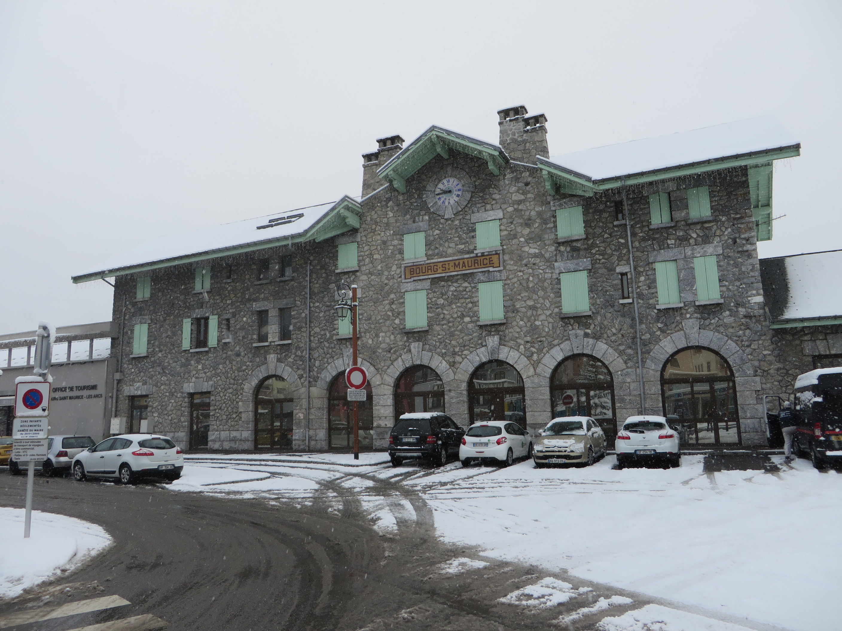 Ancien bâtiment voyageurs de la gare de Bourg-Saint-Maurice.